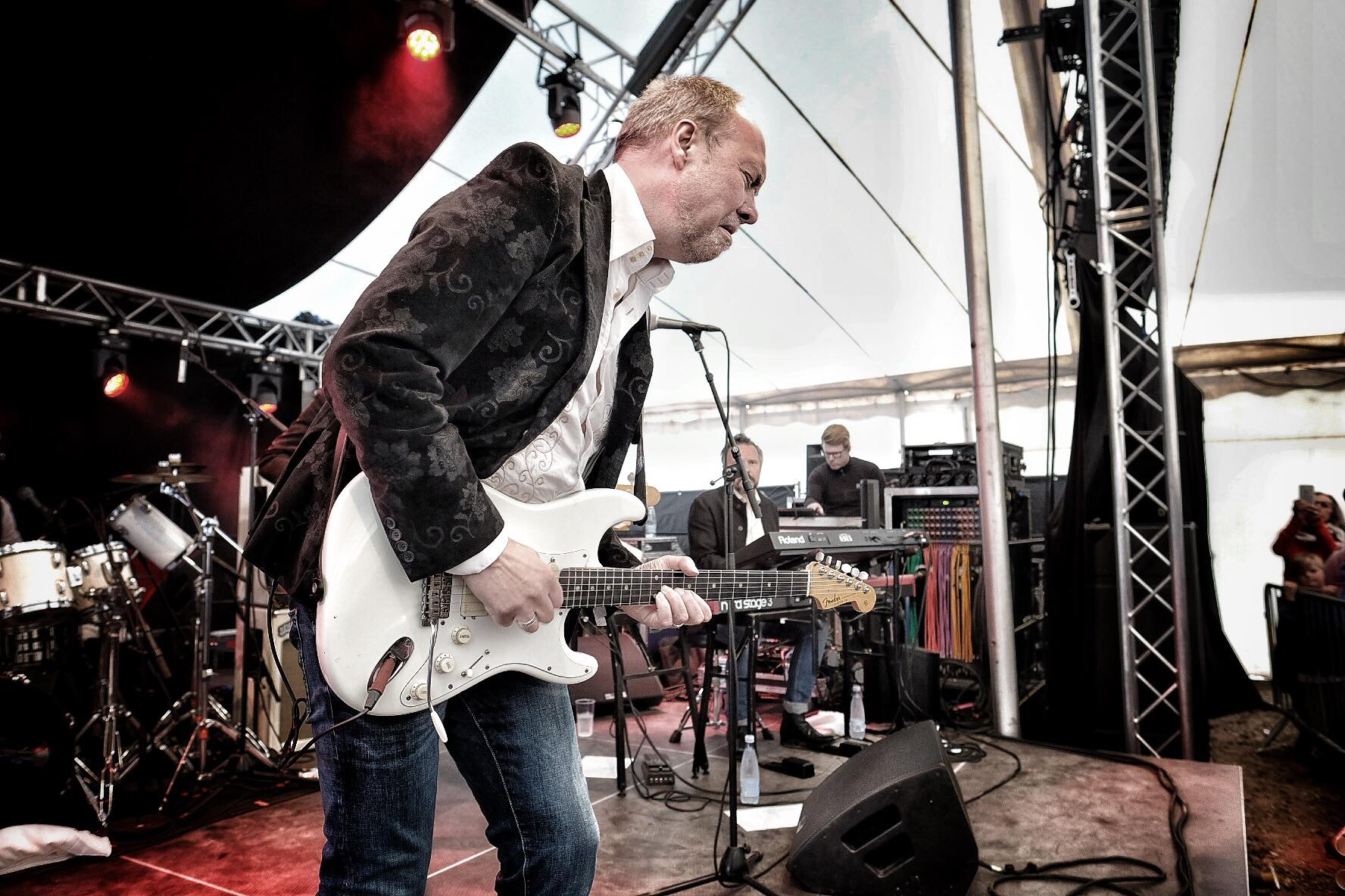 Halberg Fanø